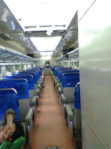 K2 AC Daop V